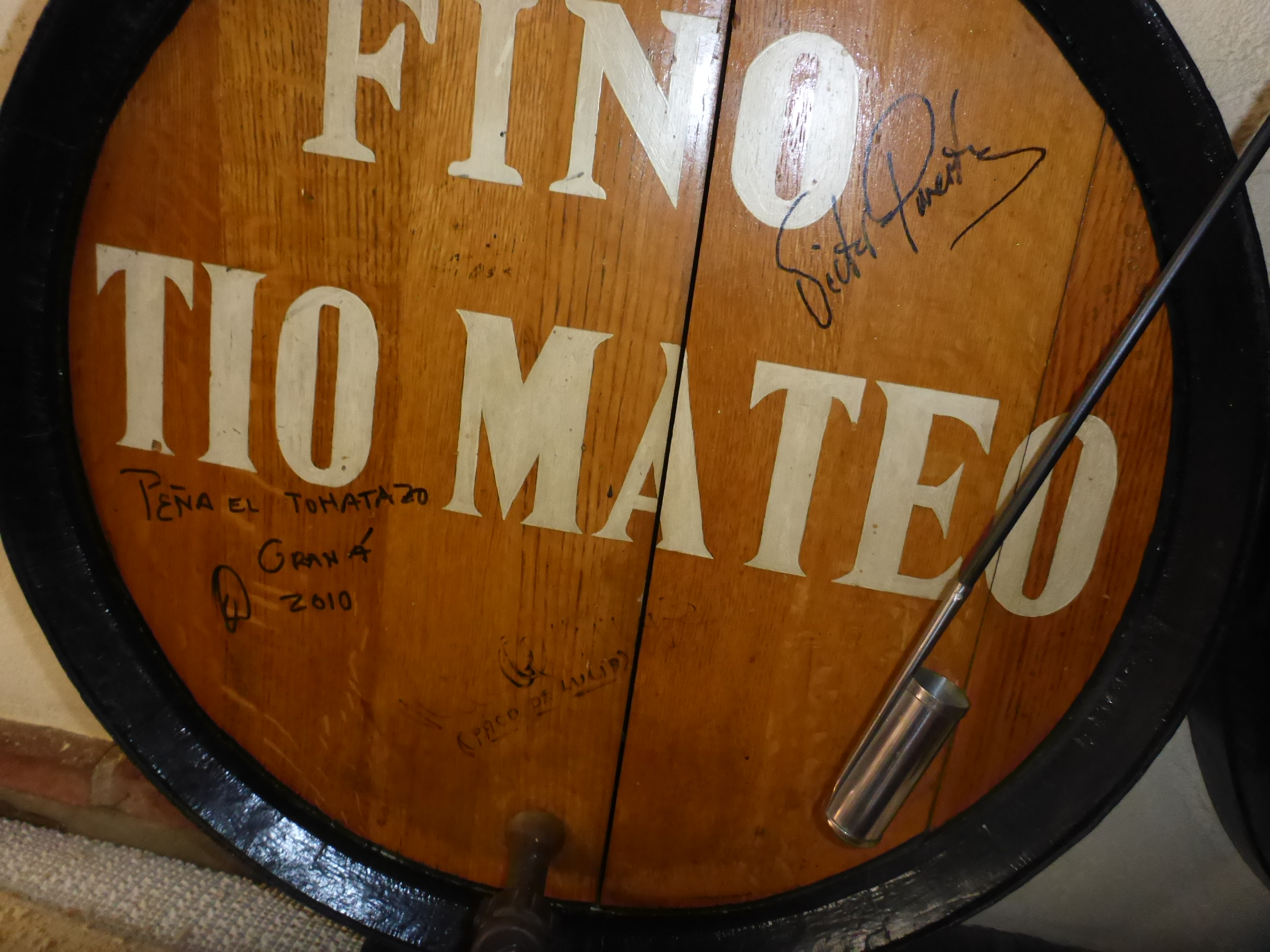 Barril de Jerez firmado por Víctor Puerto y Paco de Lucía